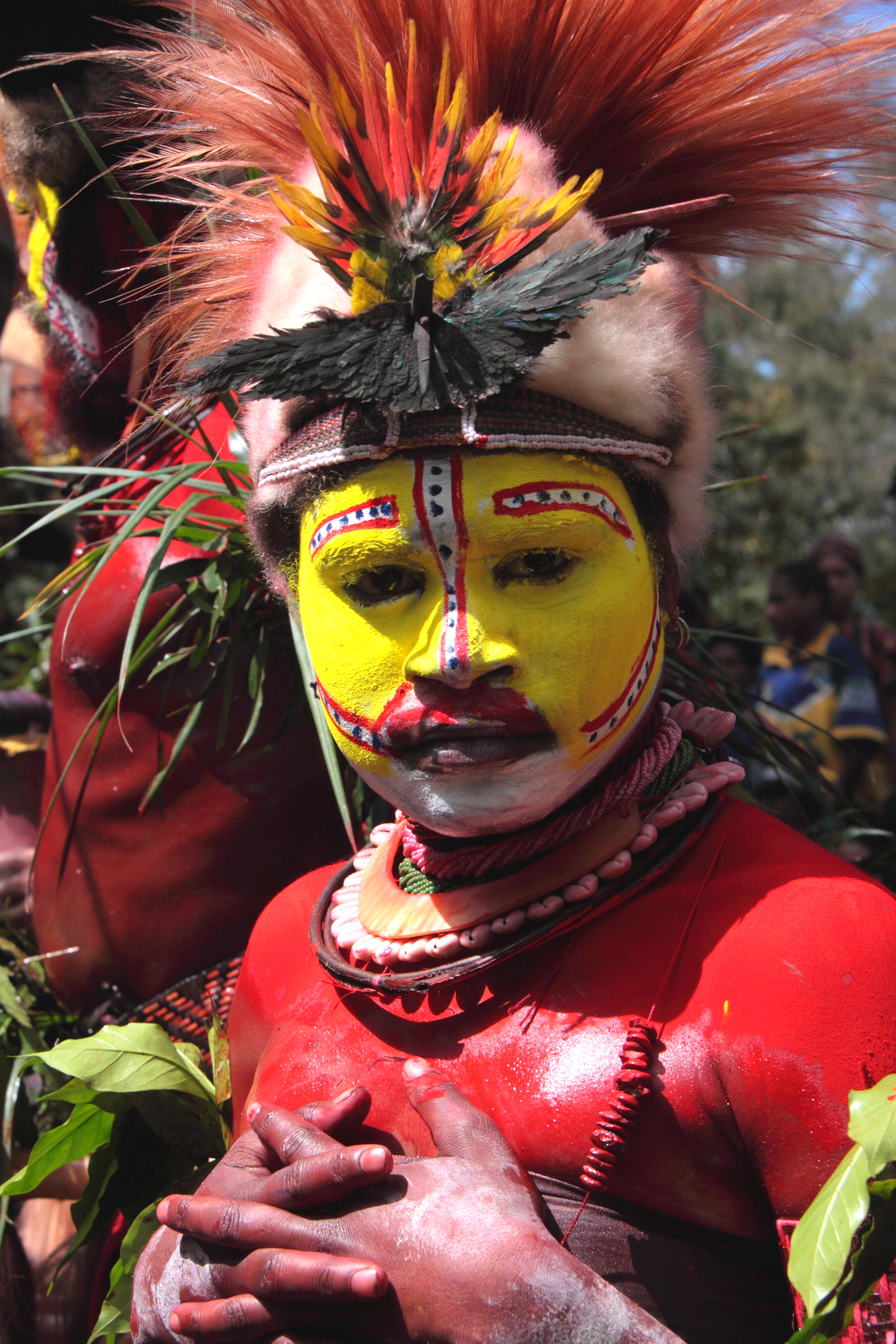 papouasie, festival de mount hagen, Koroba